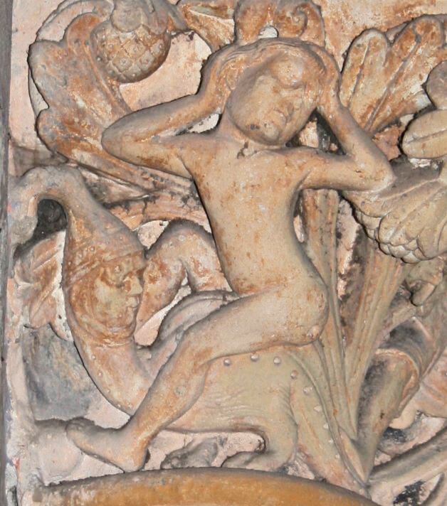 Sailekapitell zu Maria Laach.